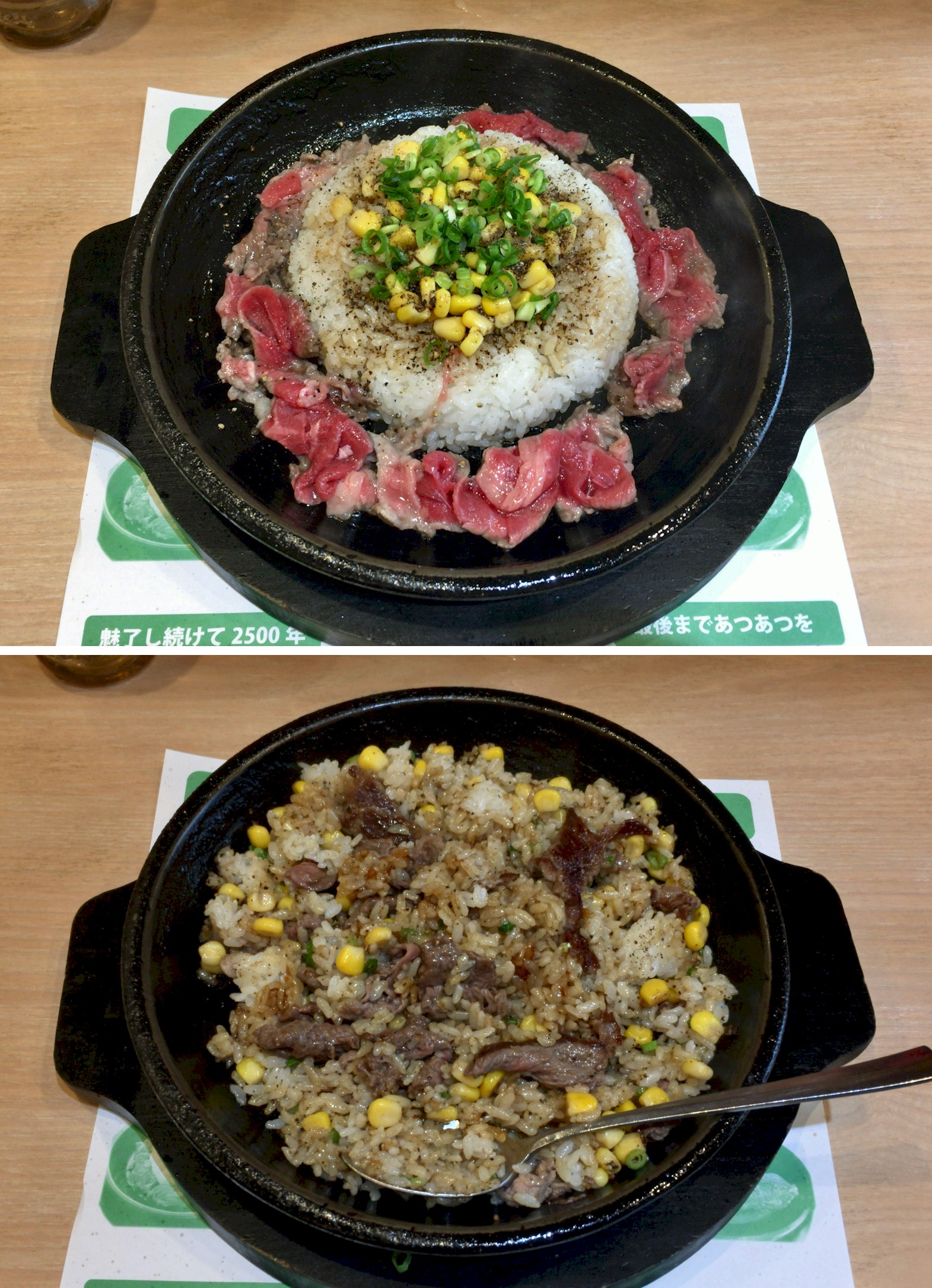 ペッパーランチの「ビーフペッパーライス」。鉄皿は熱々に加熱してあり、ジュウジュウいわせながらライスと肉を下のようによく混ぜて食べる。（そうやって食べろと案内される。）